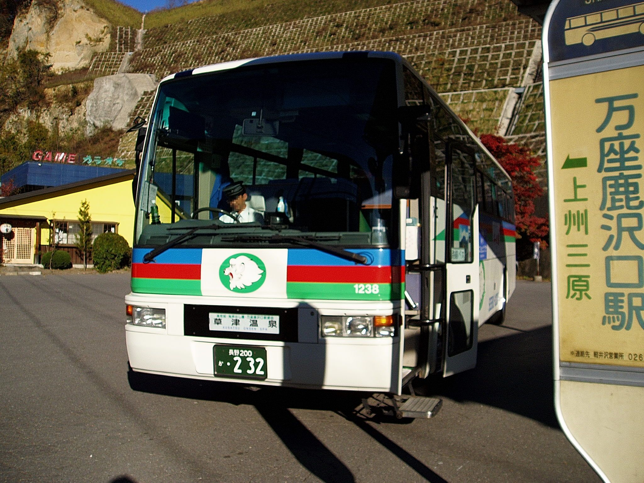 Seibu Kogen Bus Nissan Diesel U-RA520TBN (Maxion) at Manza-Kazawaguchi Sta.